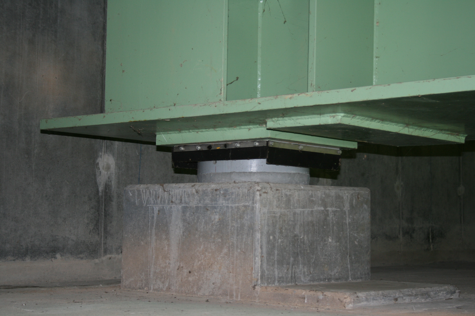 Viaduc de Briare - Pont Bowstring supportant l'autoroute A77 et franchissant le Canal de Briare et la Trézée - département du Loiret - France